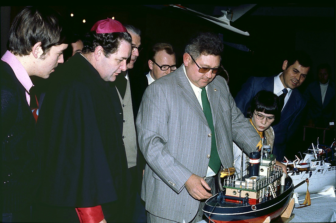 Weihbischof Alfred Kleinermeilert (2. v. l.) 1975 bei einer Modellbau-Ausstellung im Weihnachtsbasar der Kolpingsfamilie St. Mauritius Kärlich in Mülheim-Kärlich